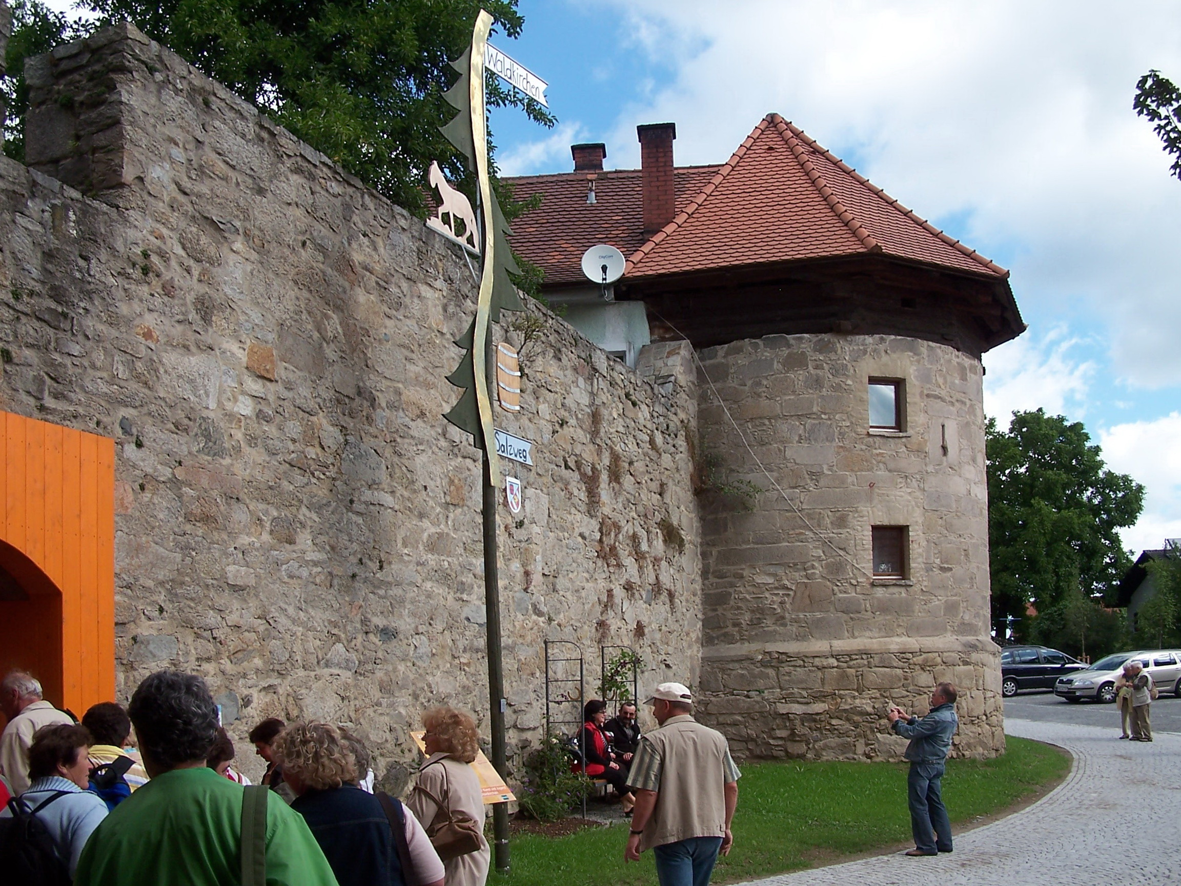 Waldkirchen, Ehem. Marktbefestigung, Ringmauer umschloss den Ort nierenförmig, Bruchsteinmauer mit Quadern und Füllsteinen, z.T. noch Schlüssellochscharten (bei Marktmühlweg 5) vorhanden, nach oben abtreppend, Rund- und Polygonaltürme an Mauerknicken feldseitig angeordnet, 3. Viertel 15. Jahrhundert, im Südwesten im Bereich Büchl 8- 14 und Büchl 22 Ringmauer zweigeschossig erhalten mit Fenstereinbrüchen.